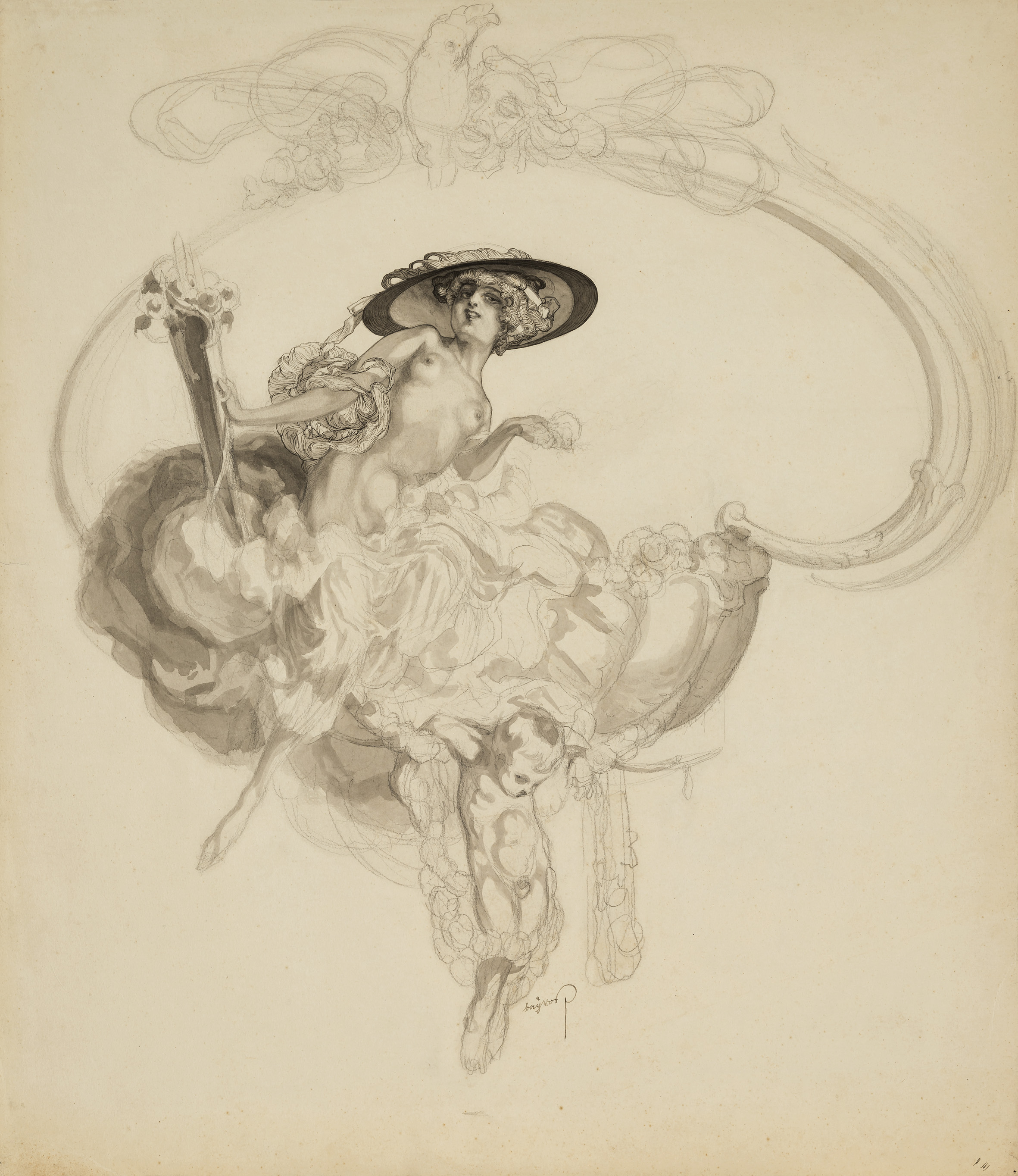 Franz von Bayros: Venus triumphans, Tusche (Feder und Pinsel) über Bleistift auf Papier, 51 x 44 cm, Rechts unten signiert